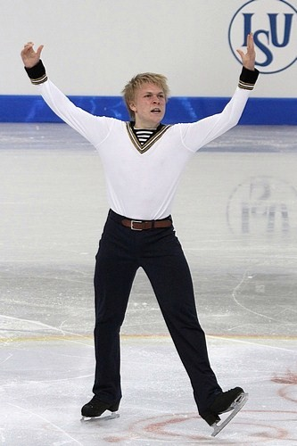 Маркус Бьёрк (Швеция) на чемпионате мира по фигурному катанию среди юниоров 2012